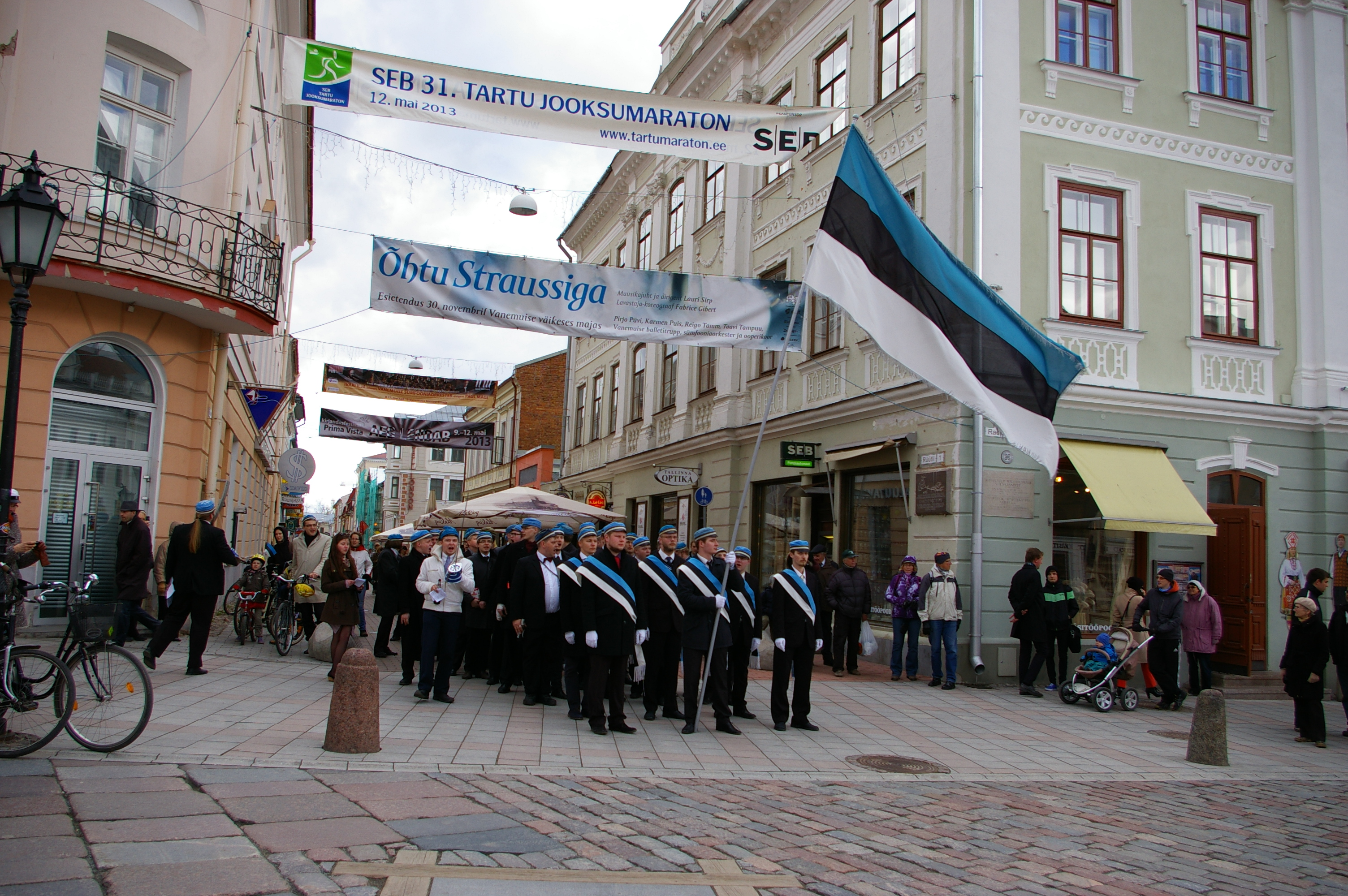 Raeplatsi ääres